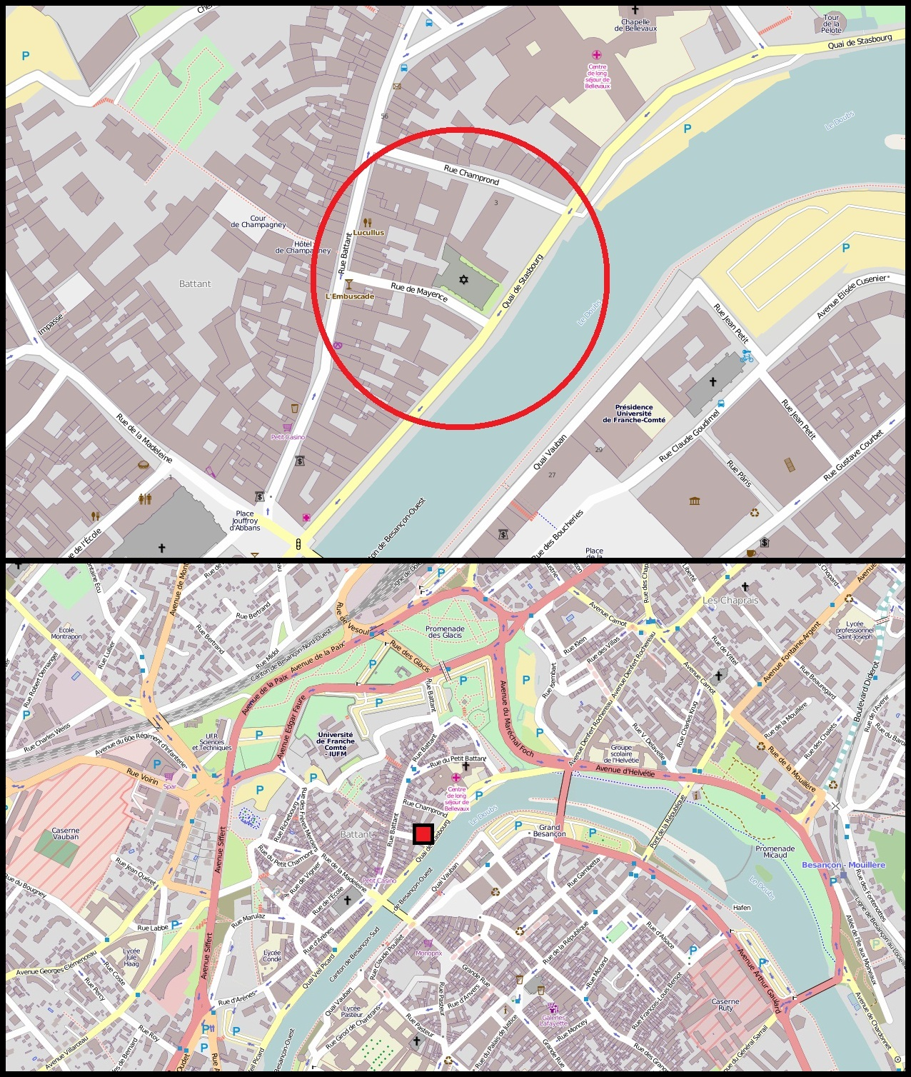 Carte du cimetière juif de Besnaçon réalisée sur Paint à partir de fichiers originaires de OpenStreetMap (